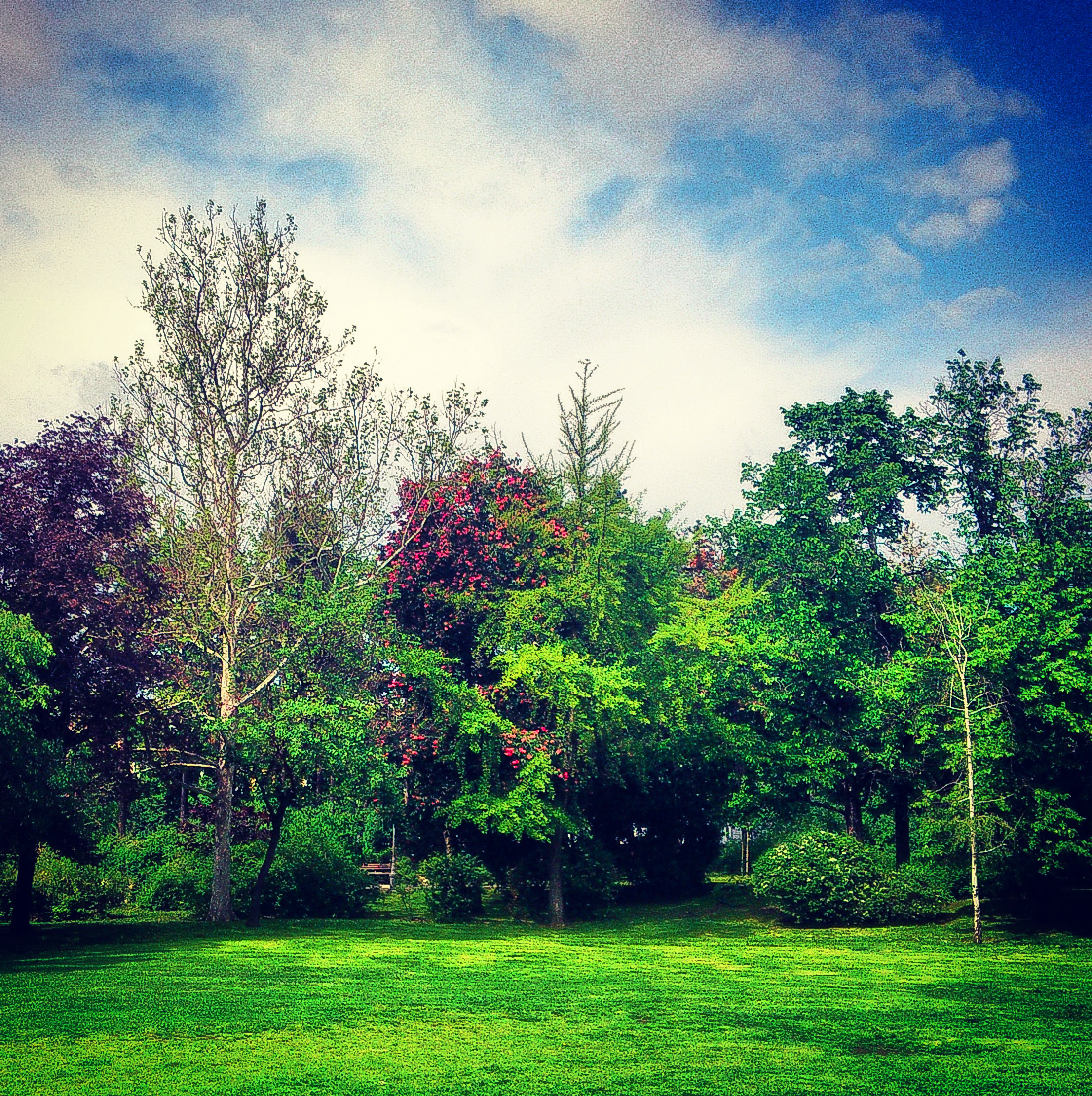 Ово је фотографија заштићеног природног добра у Србији под шифром: СП086This is a a photo of a natural area in Serbia with ID: СП086 Пролеће у Дунавском парку